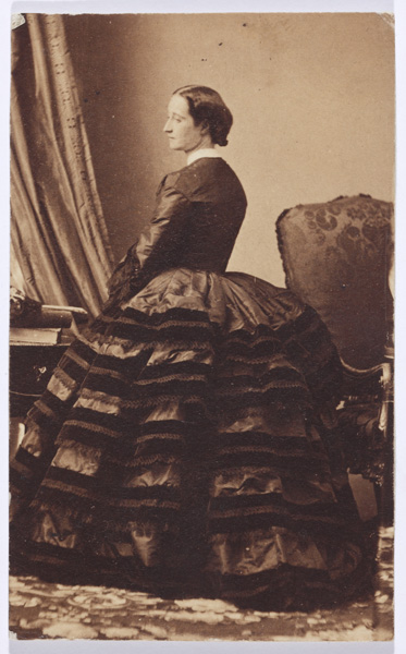 Carte de visite. La Emperatriz de Francia, Eugenia de Montijo.